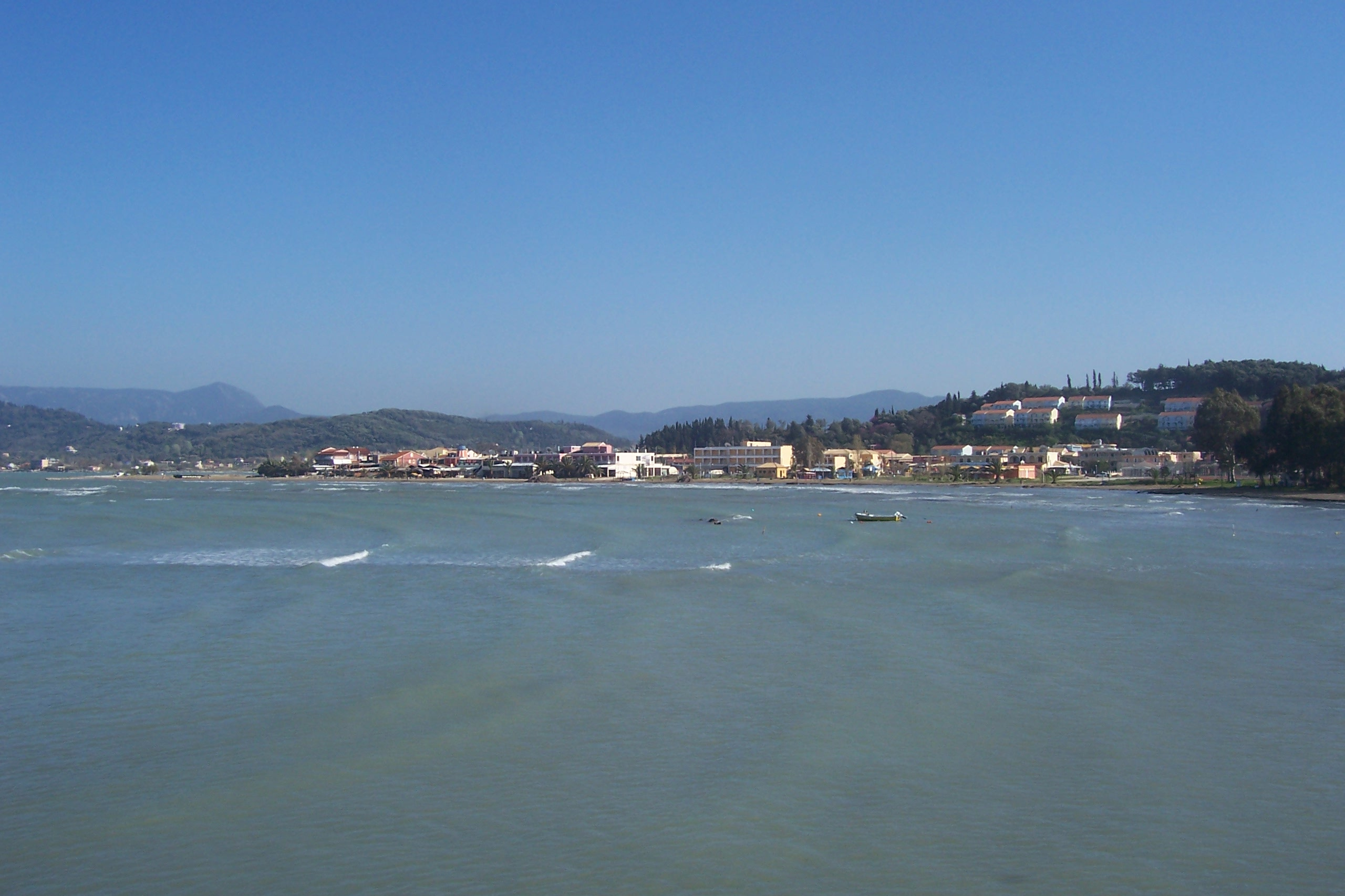 Παραλία του Σιδαριού από το Κανάλι της Αγάπης.